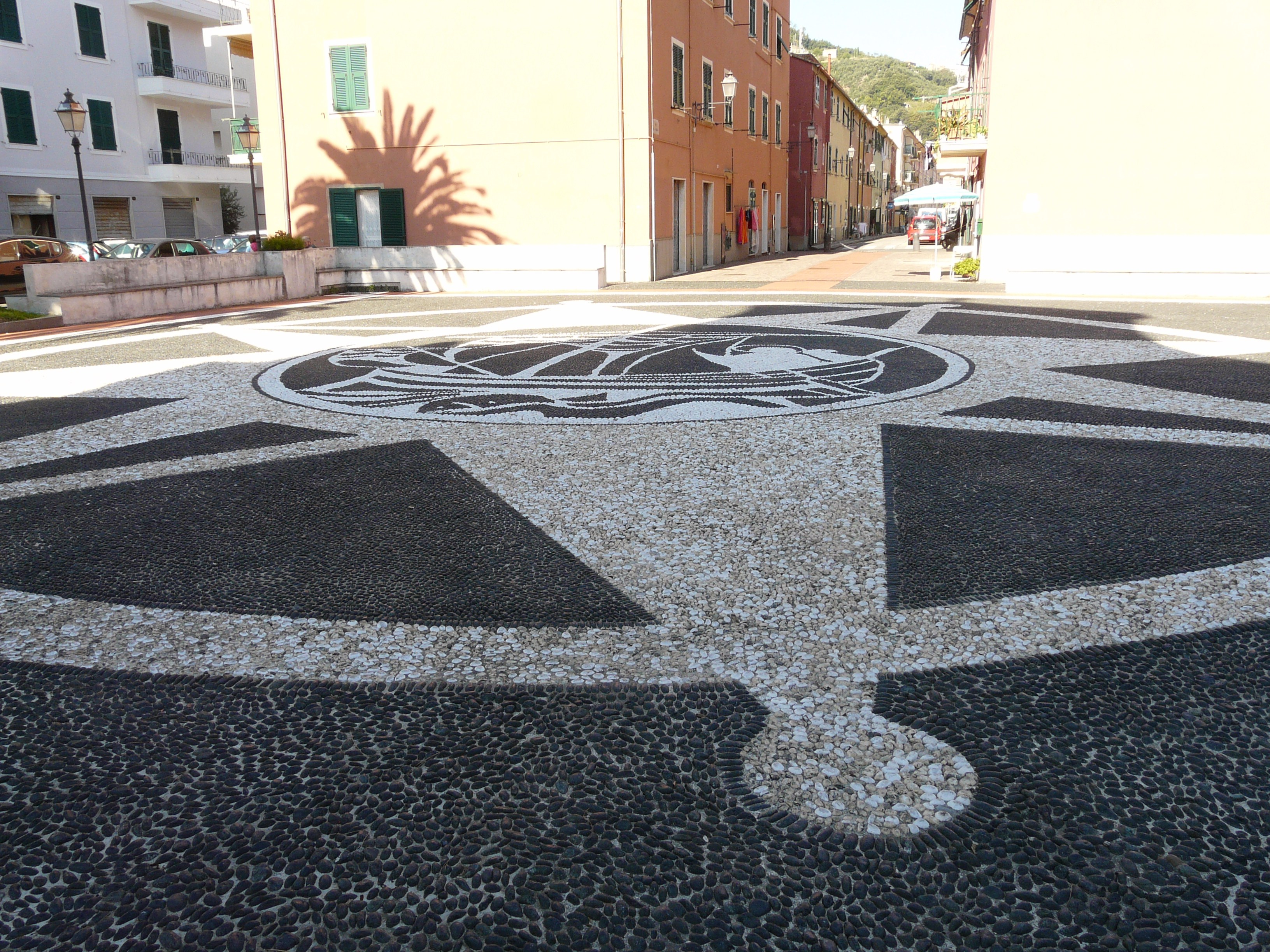 Sagrato della chiesa di San Pietro nella frazione di Riva Trigoso, Sestri Levante, Liguria, Italia